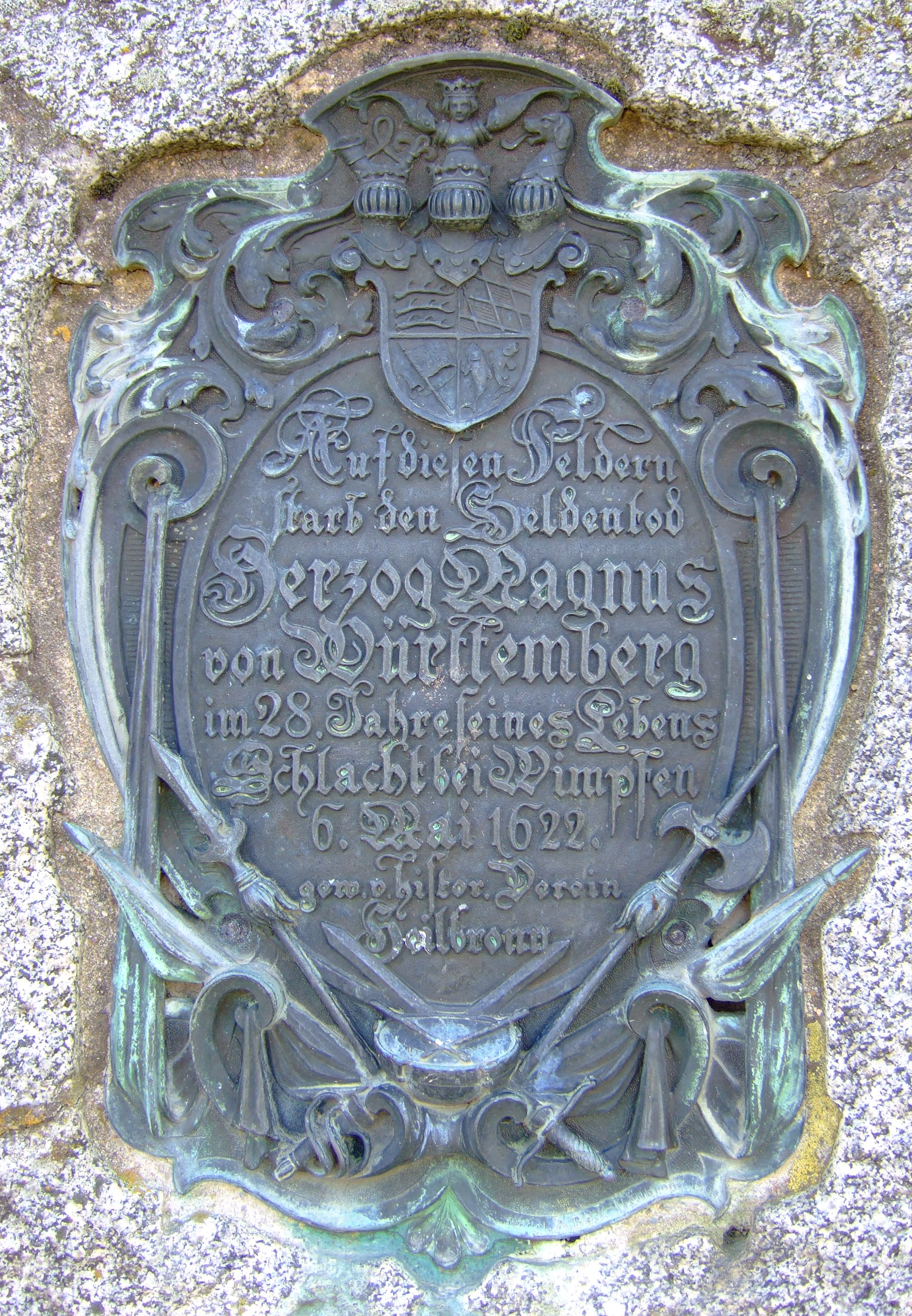 Roll of honour for Herzog Magnus von Württemberg (Schlacht bei Wimpfen 1622)